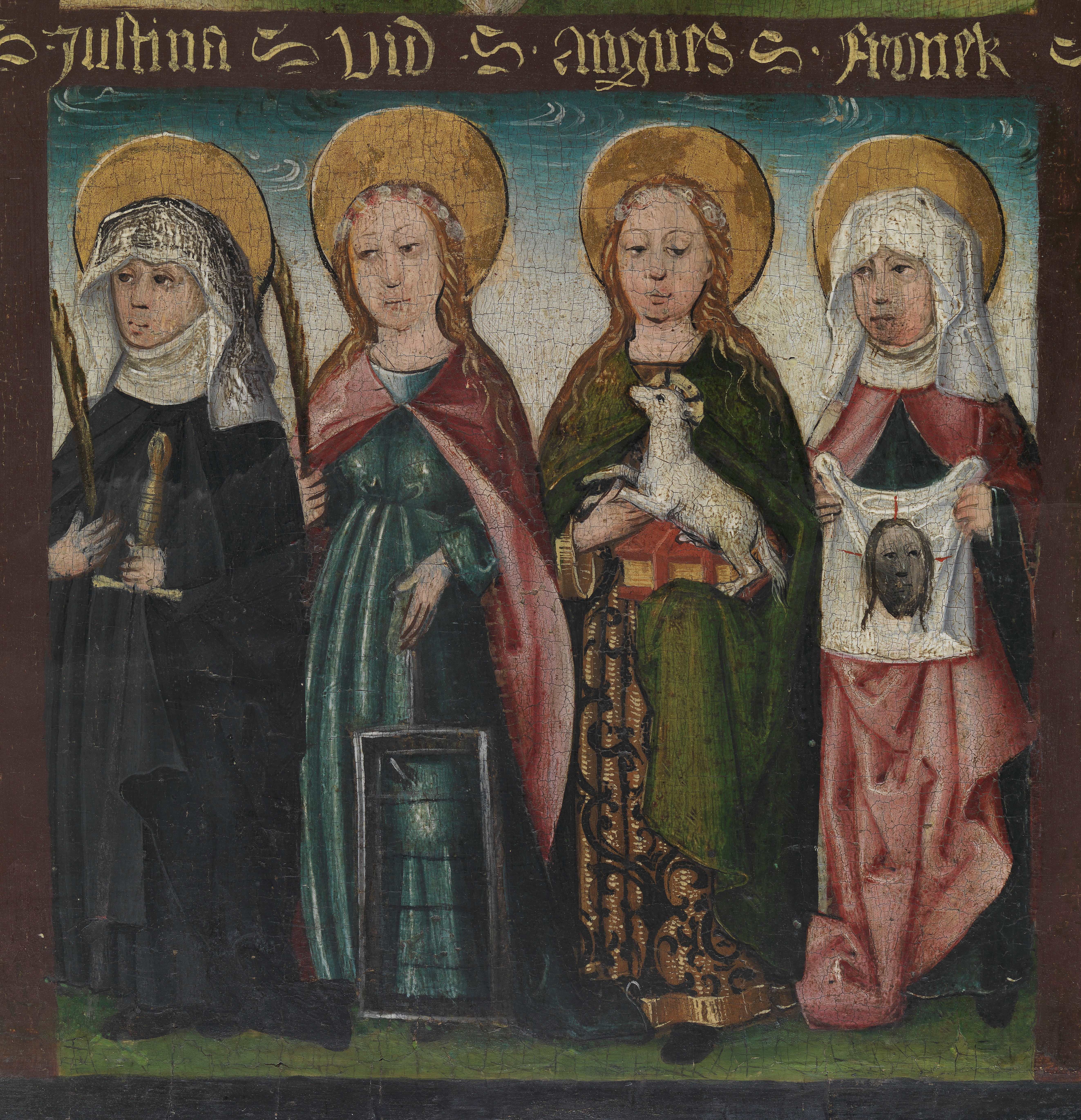 Teil einer Votivtafel mit 16 Legendenszenen und Heiligen, Franken, um 1500, Tannenholz, Germanisches Nationalmuseum in Nürnberg.